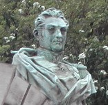 Photo du buste de François Gédéon Bailly de Monthyon à l'entrée du Jardin de l'Etat, à Saint-Denis de la Réunion.